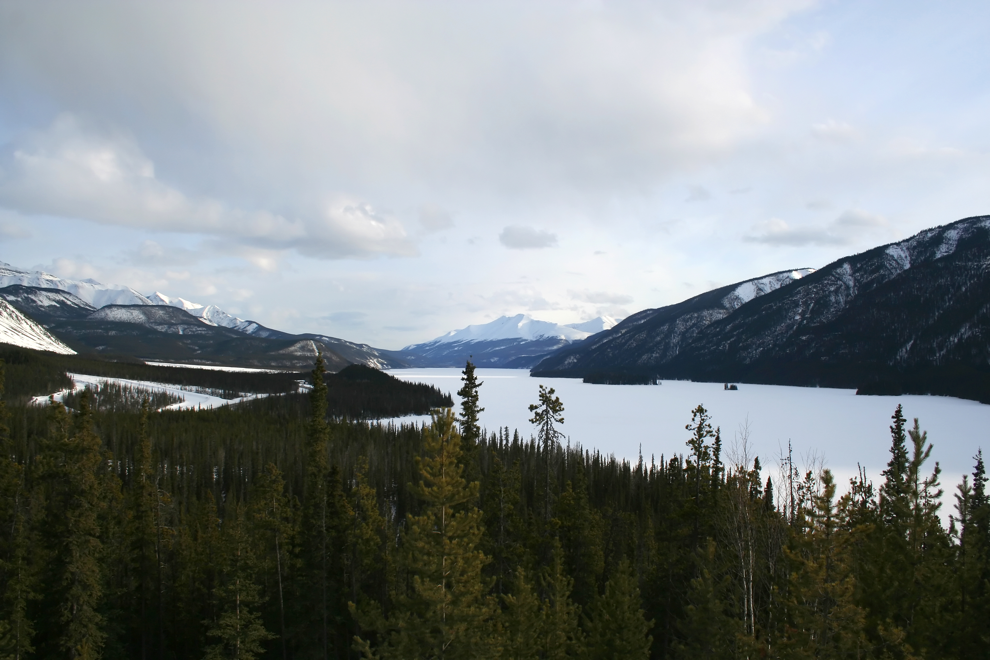 Lake Muncho, BC